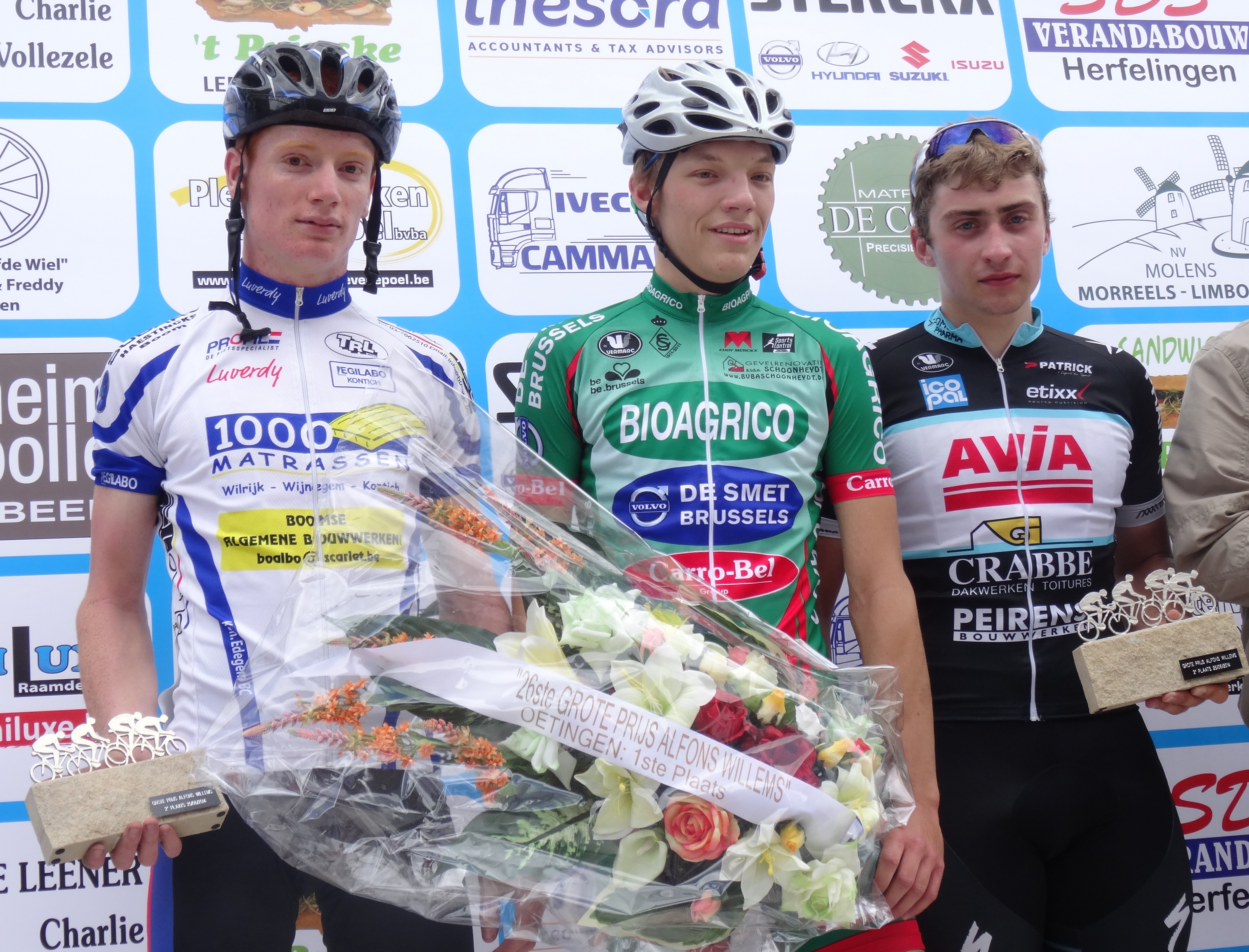 Reportage photographique réalisé le mercredi 25 juin à l'occasion du départ et de l'arrivée de l'Internationale Wielertrofee Jong Maar Moedig 2014 à Oetingen (Gooik), Belgique.